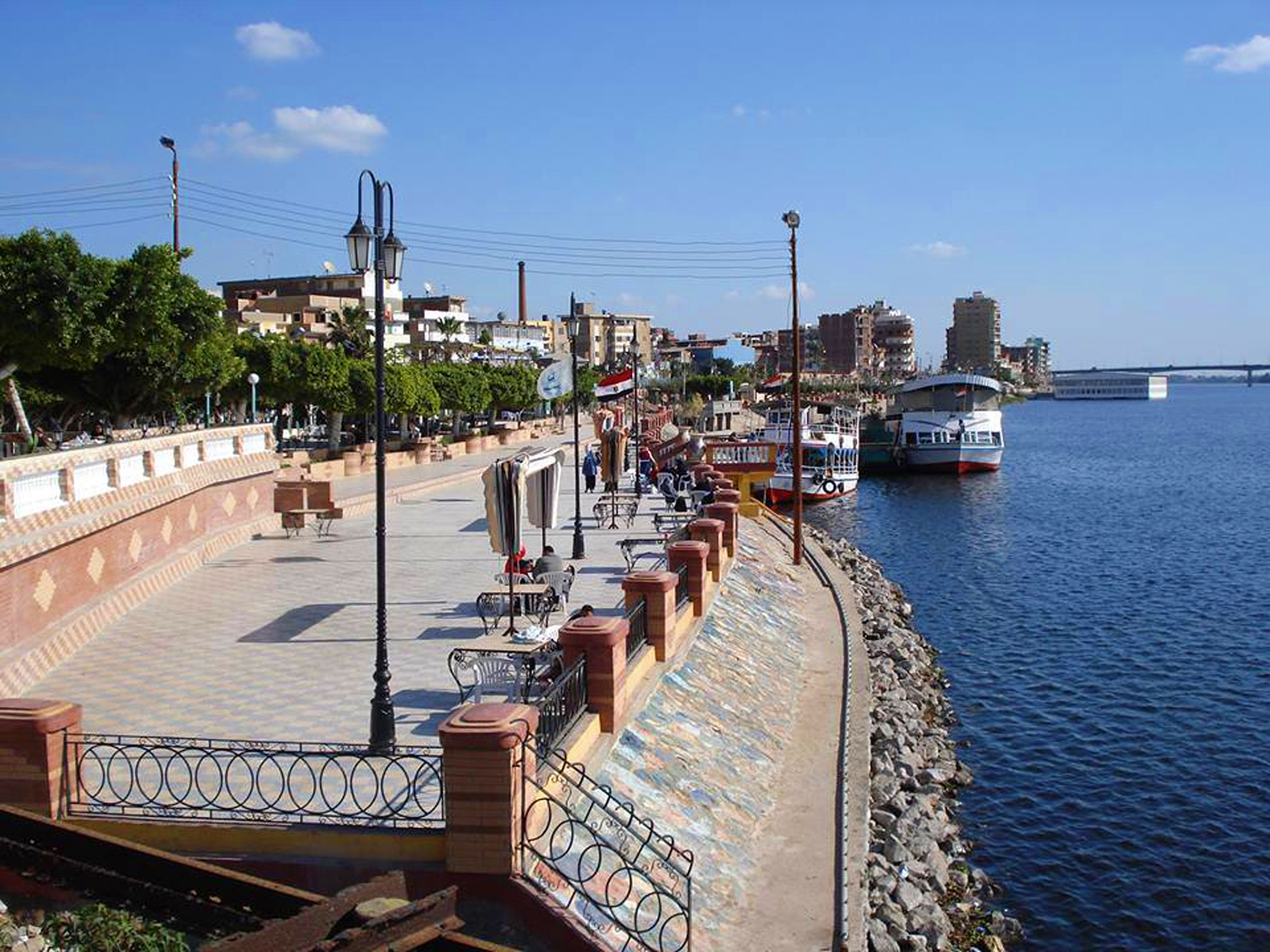 حديقة الأسرة والطفولة، دسوق